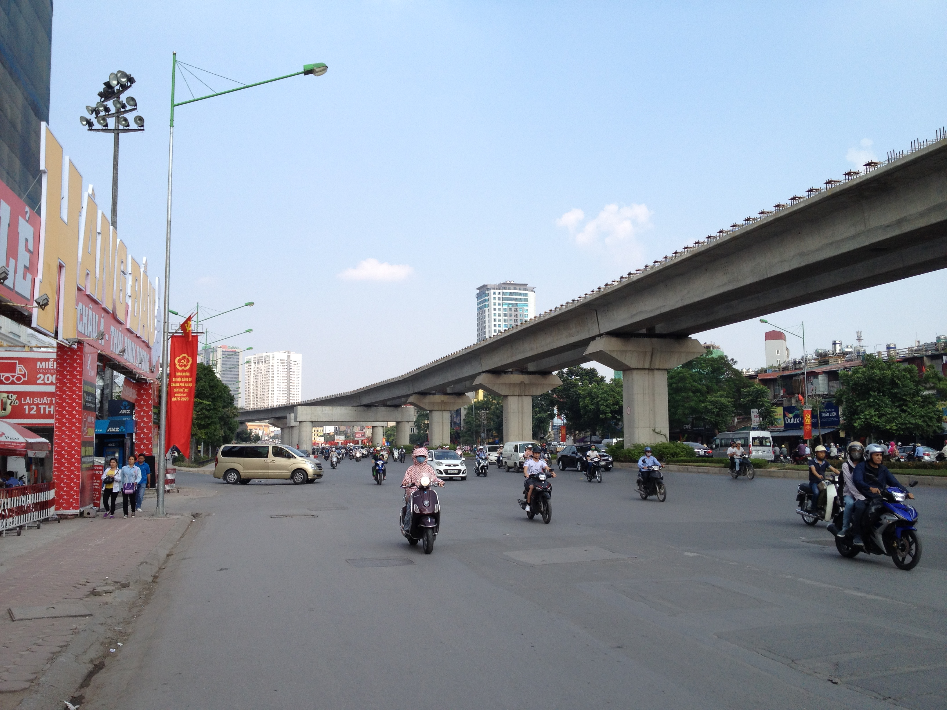 Hà Nội, Việt Nam.